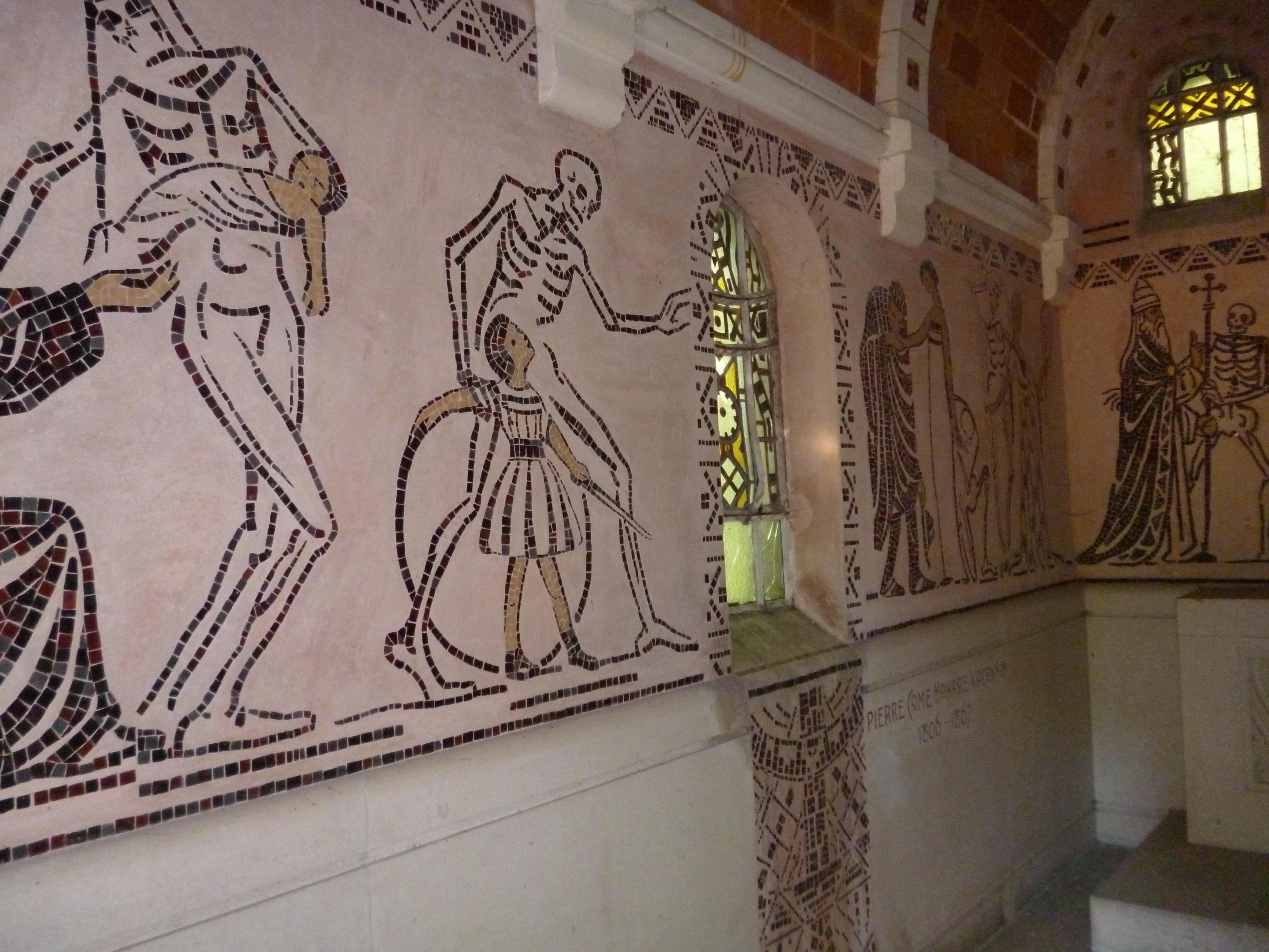 Chapelle funéraire de la famille Bellemère, connue aussi sous le nom de Chapelle de Chepoix, située à Chepoix (Oise, Picardie), classée en 2011